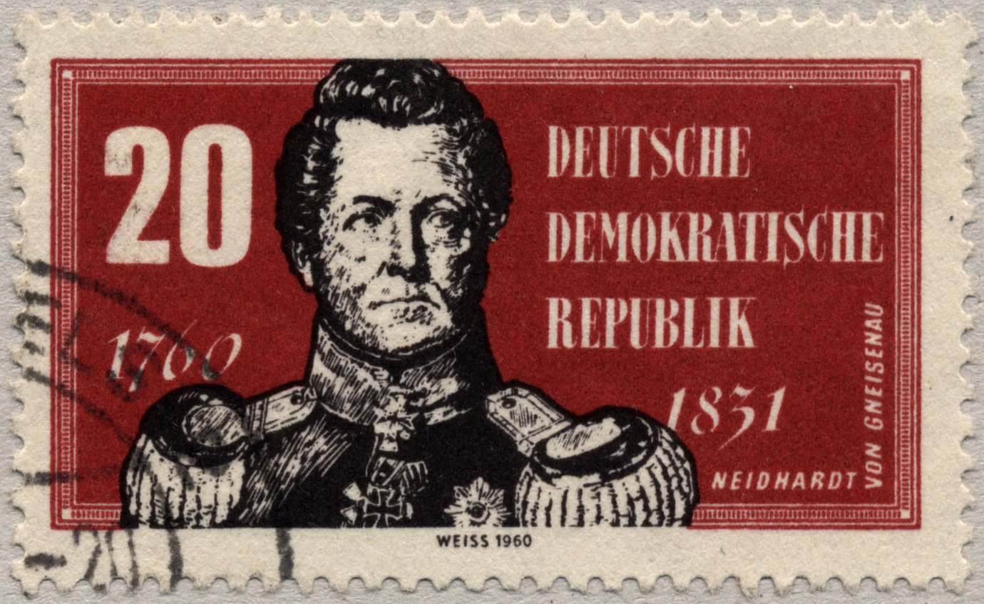 DDR-Briefmarke von August Neidhardt von Gneisenau Ausgabepreis: 20 Pf. Erstausgabetag / First Day of Issue: 1960 Auflage: Entwurf: Weiss? Druck: Michel-Katalog-Nr